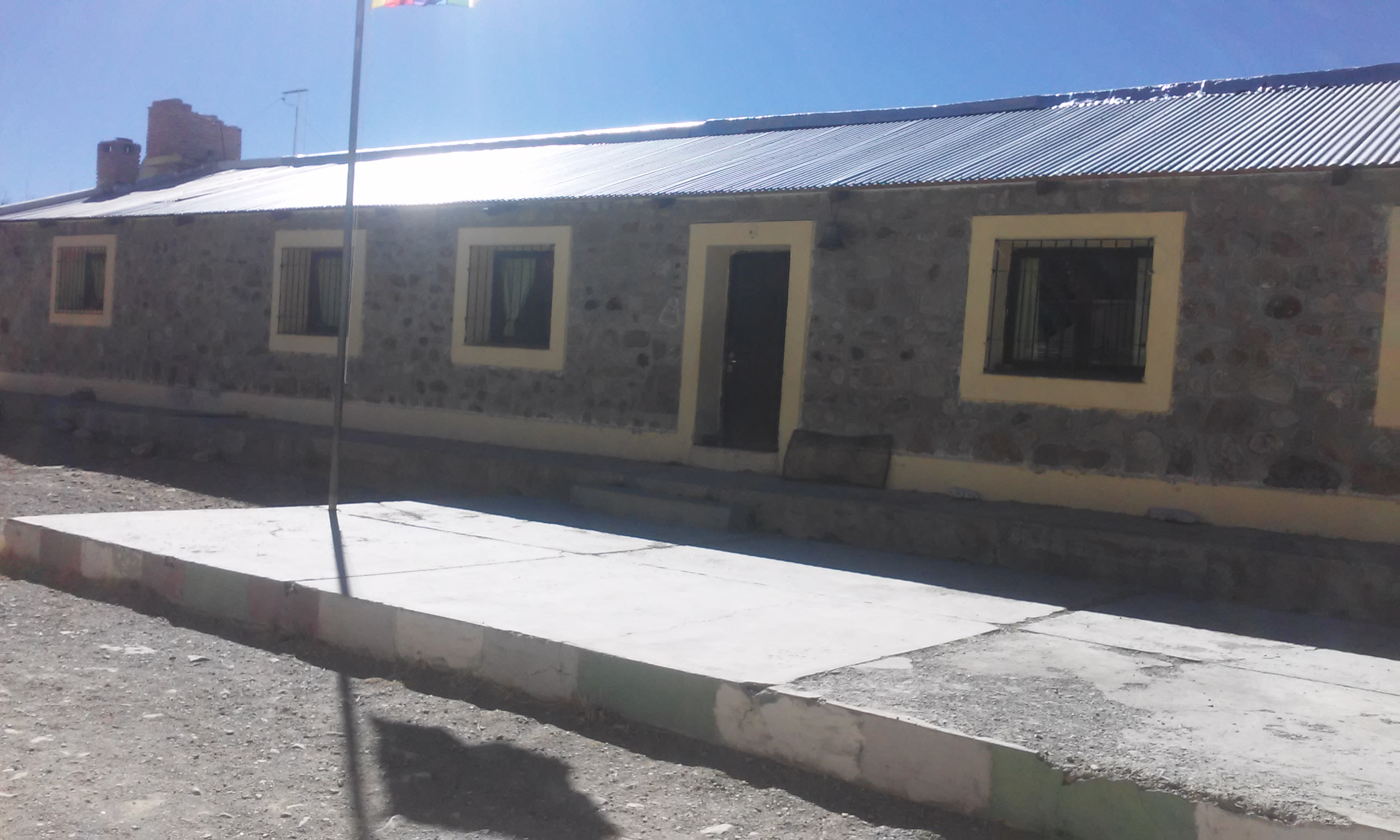 Se encuentra ubicada en el paraje Potrero de Chañi, a 150 km de Salta Capital, al pie del nevado de Chañi, casi a 6.000 m.s.n.medificio escolar